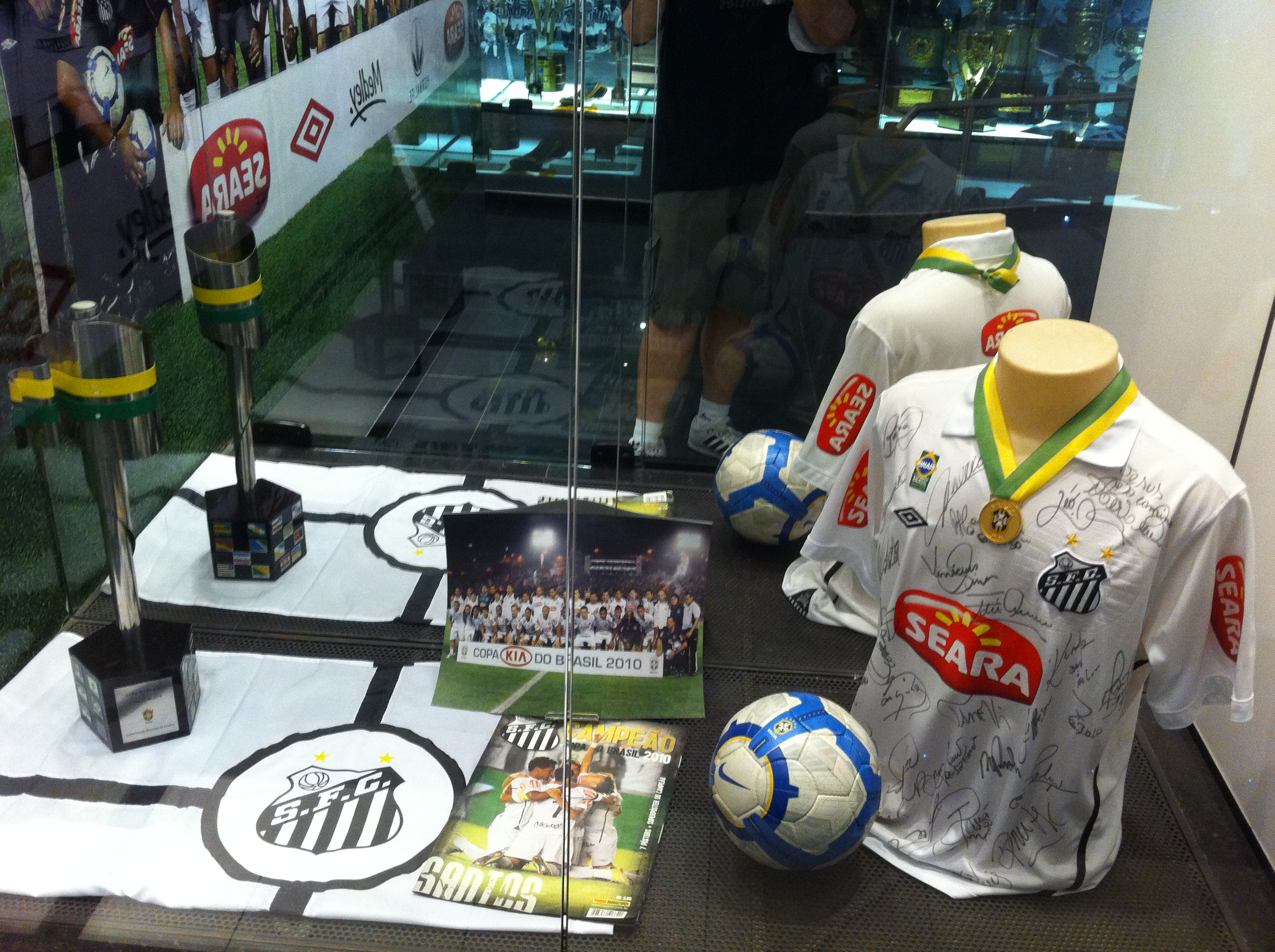 Conquistado pelo Santos FC na Copa do Brasil 2010